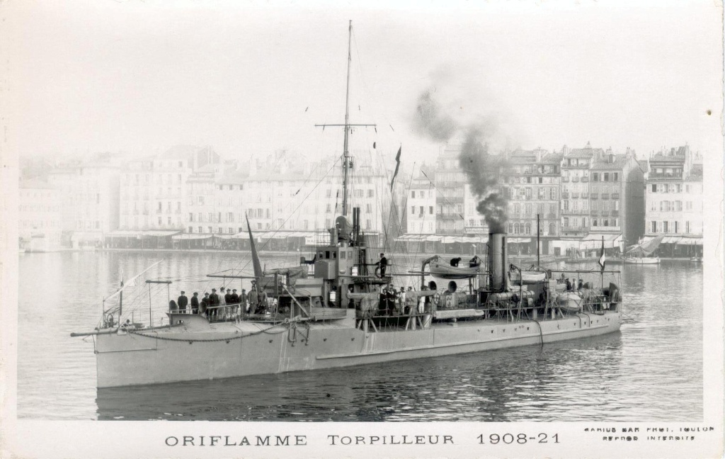 Destroyer français Oriflamme de classe Branlebas (1905-1909)